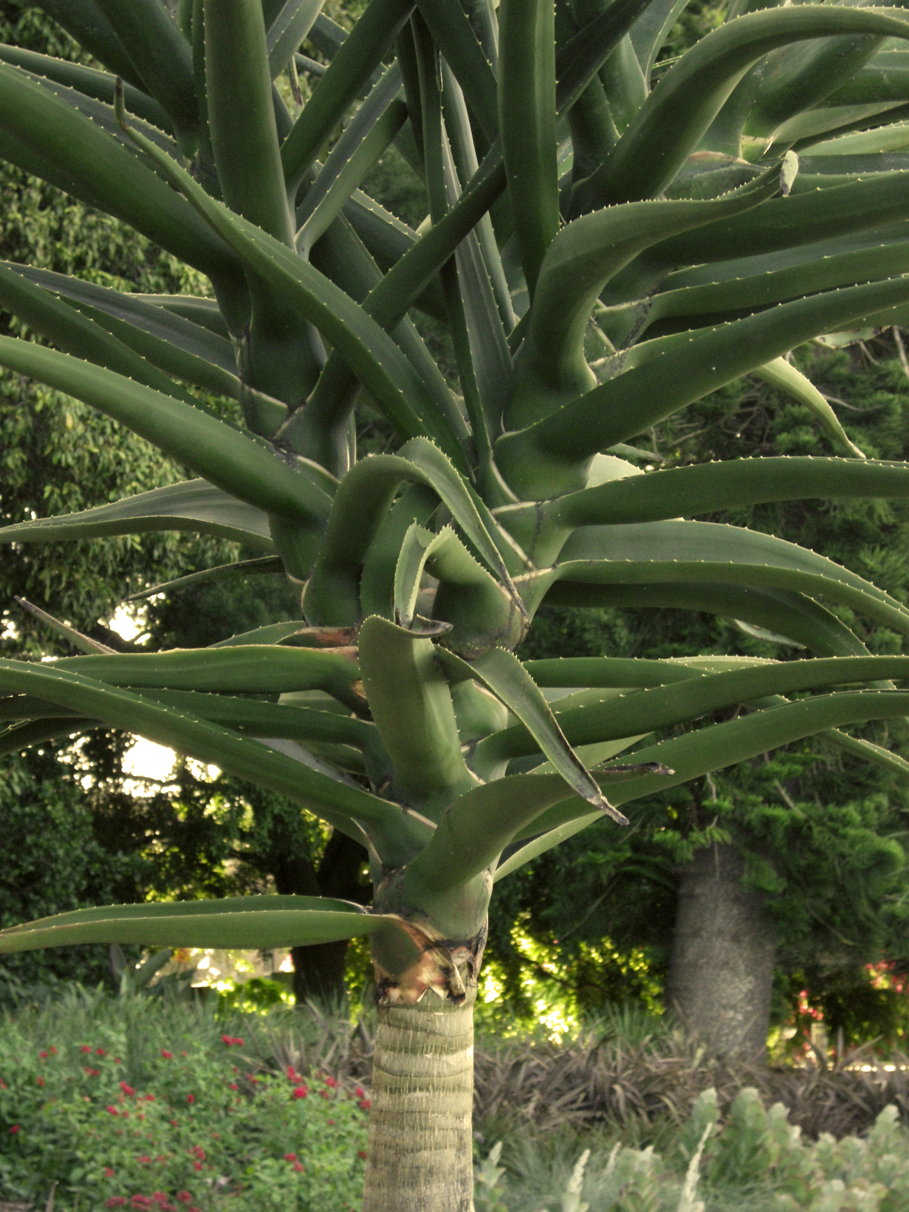 Aloe bainesii (tree aloe)